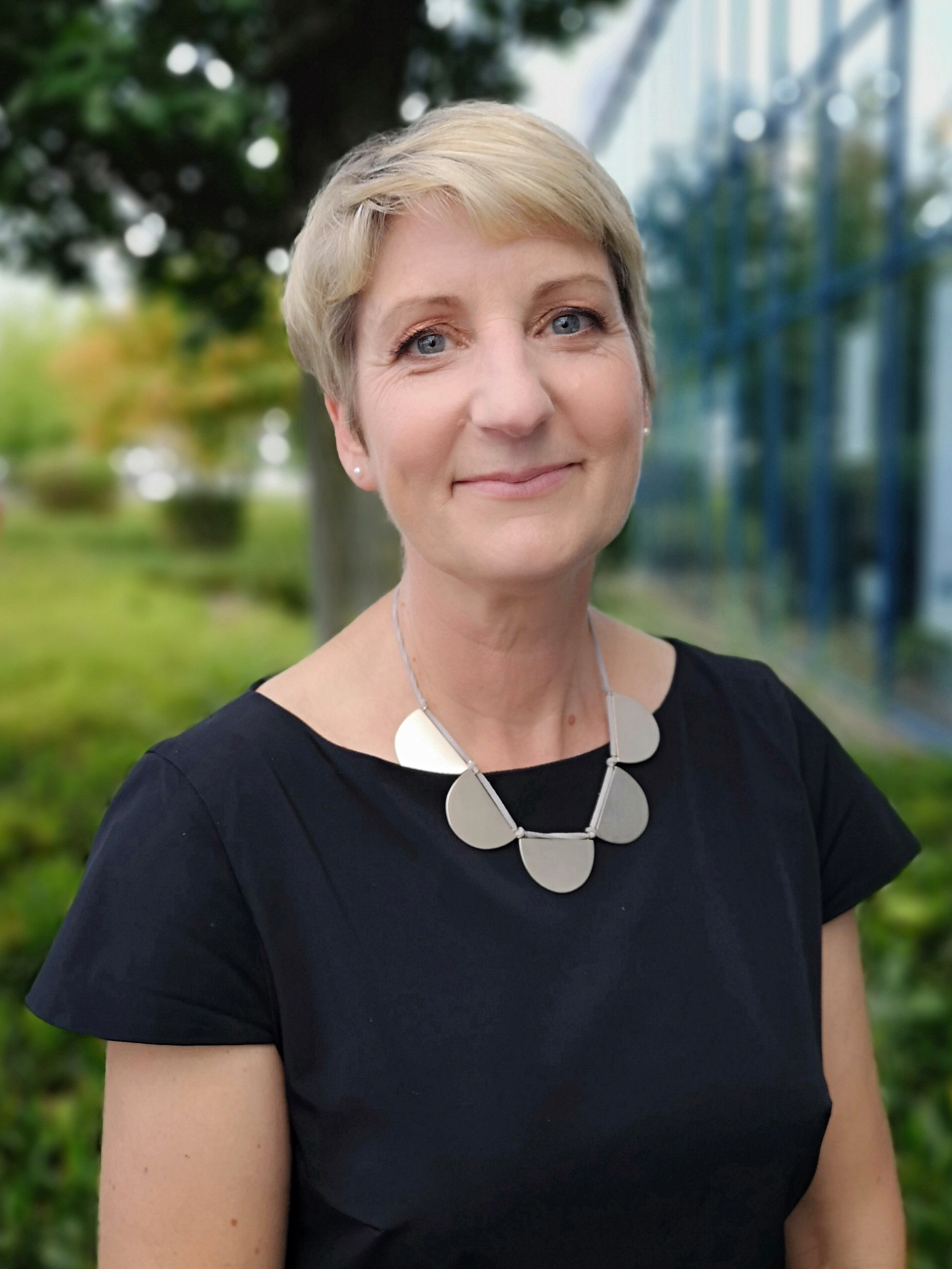 Anne Gelinek (2018)